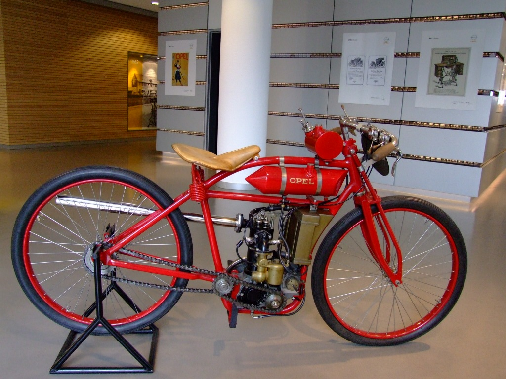 Opel Motorrad 1921-22